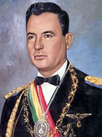 Foto oficial do presidente boliviano René Barrientos Ortuño.